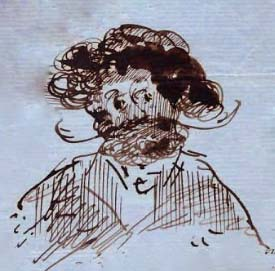 Автопортрет Роже де Бовуар. Фрагмент рукописи. Около 1840 года